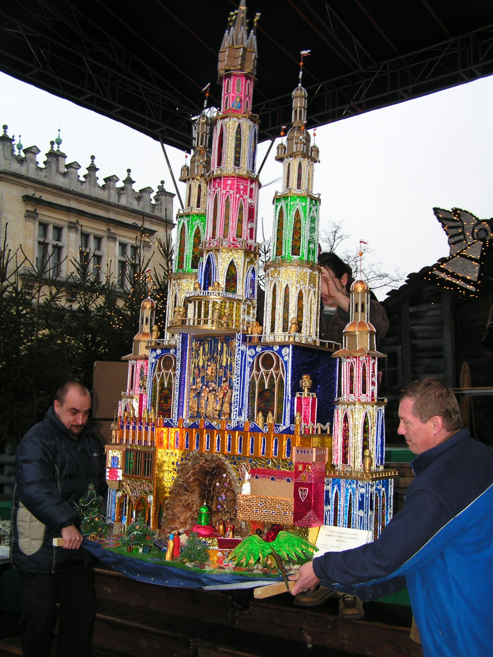 Szopka krakowska podczas konkursu na najpiękniejszą szopkę na rynku w Krakowie